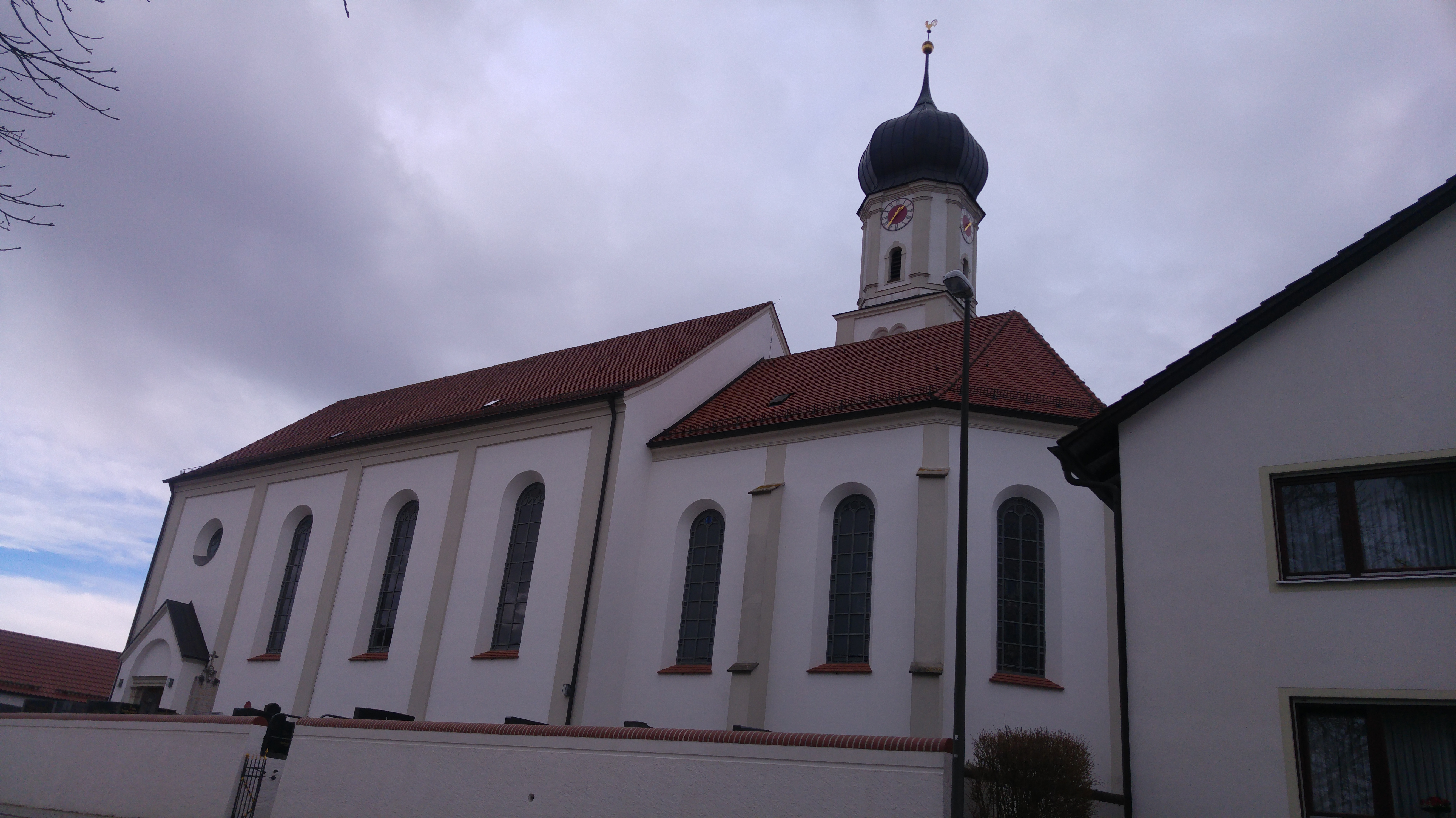 Katholische Pfarrkirche St. Peter und Paul in Hollenbach